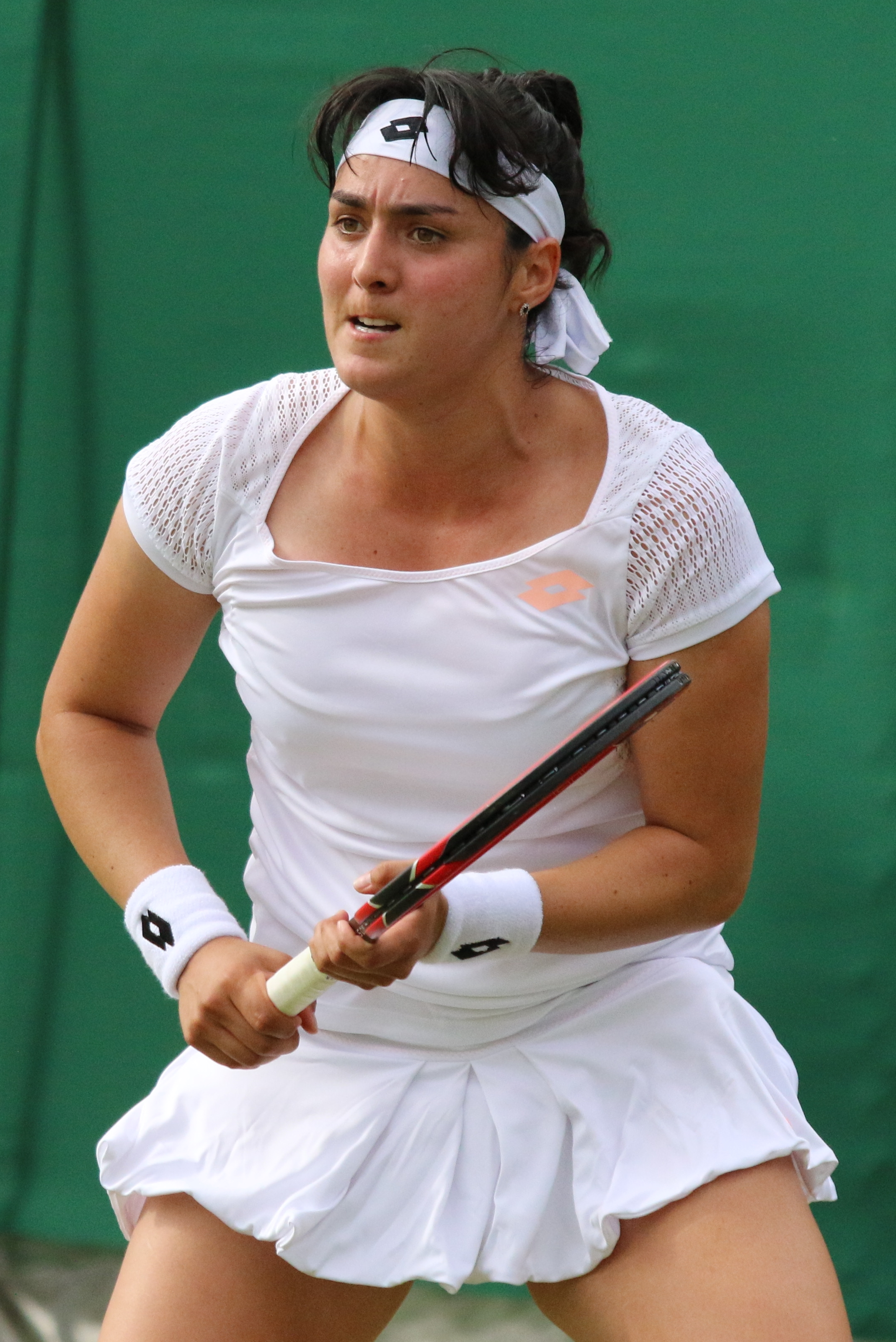 Jabeur WMQ16 (8)